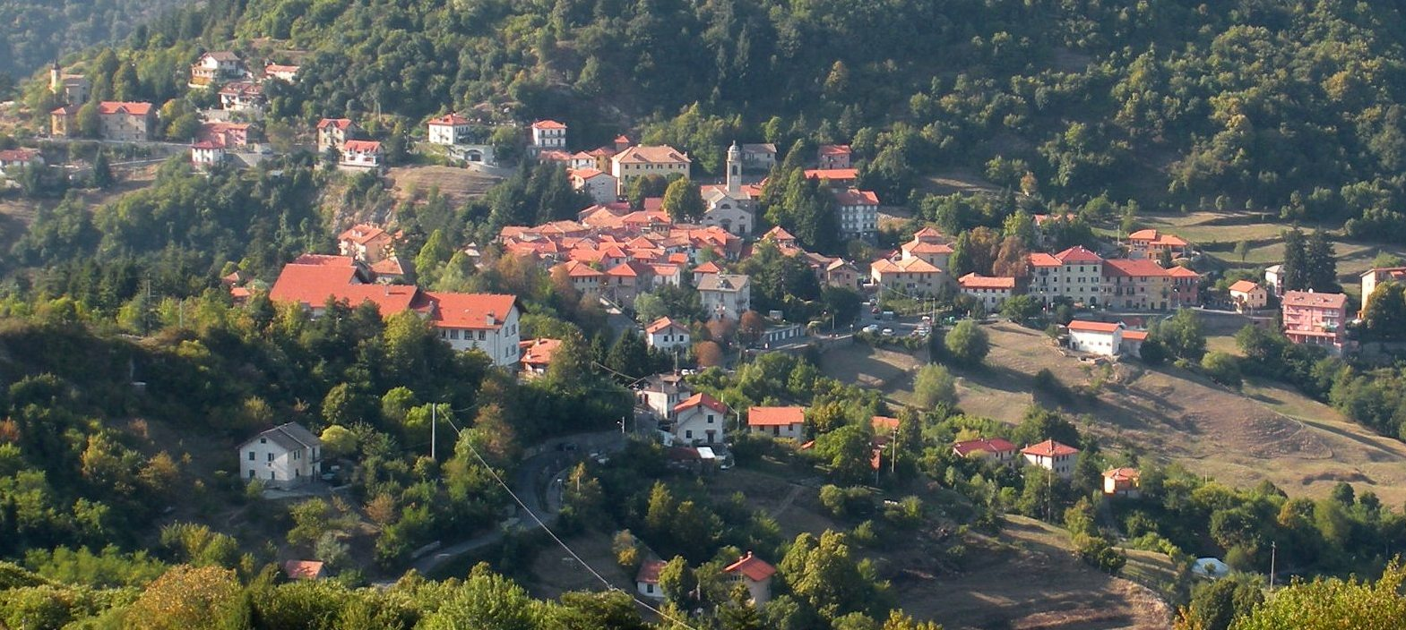 Veduta di Crocefieschi (prov. Genova) Foto propria Settembre 2009